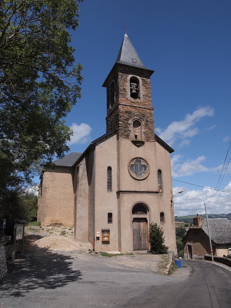 Ayssènes, église St-Rémy du XIXème siècle à St-Rémy